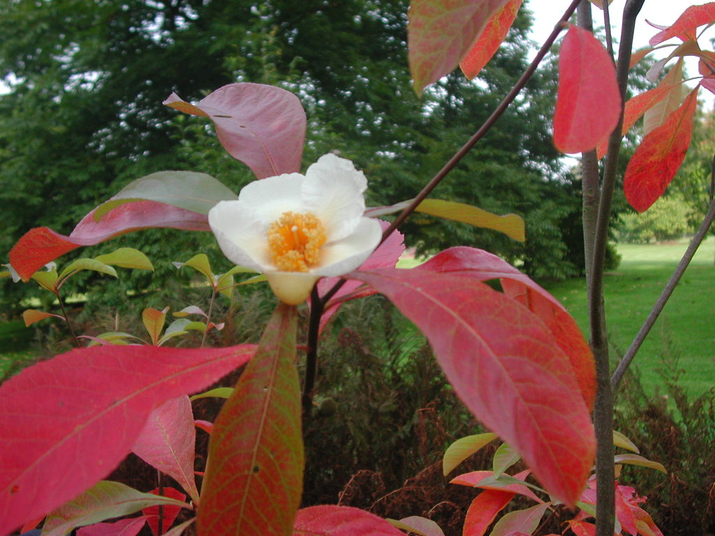 Franklinia alatamaha